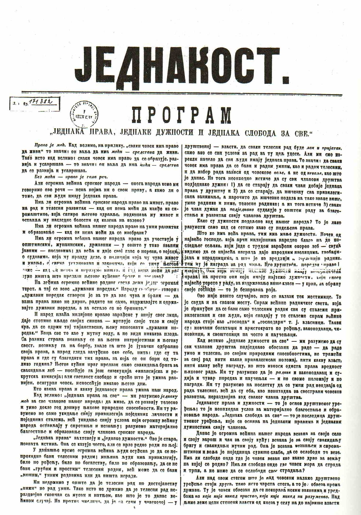 Факсимил прве стране листа Једнакост који је изашао у Новом Саду 1. јуна 1872. године